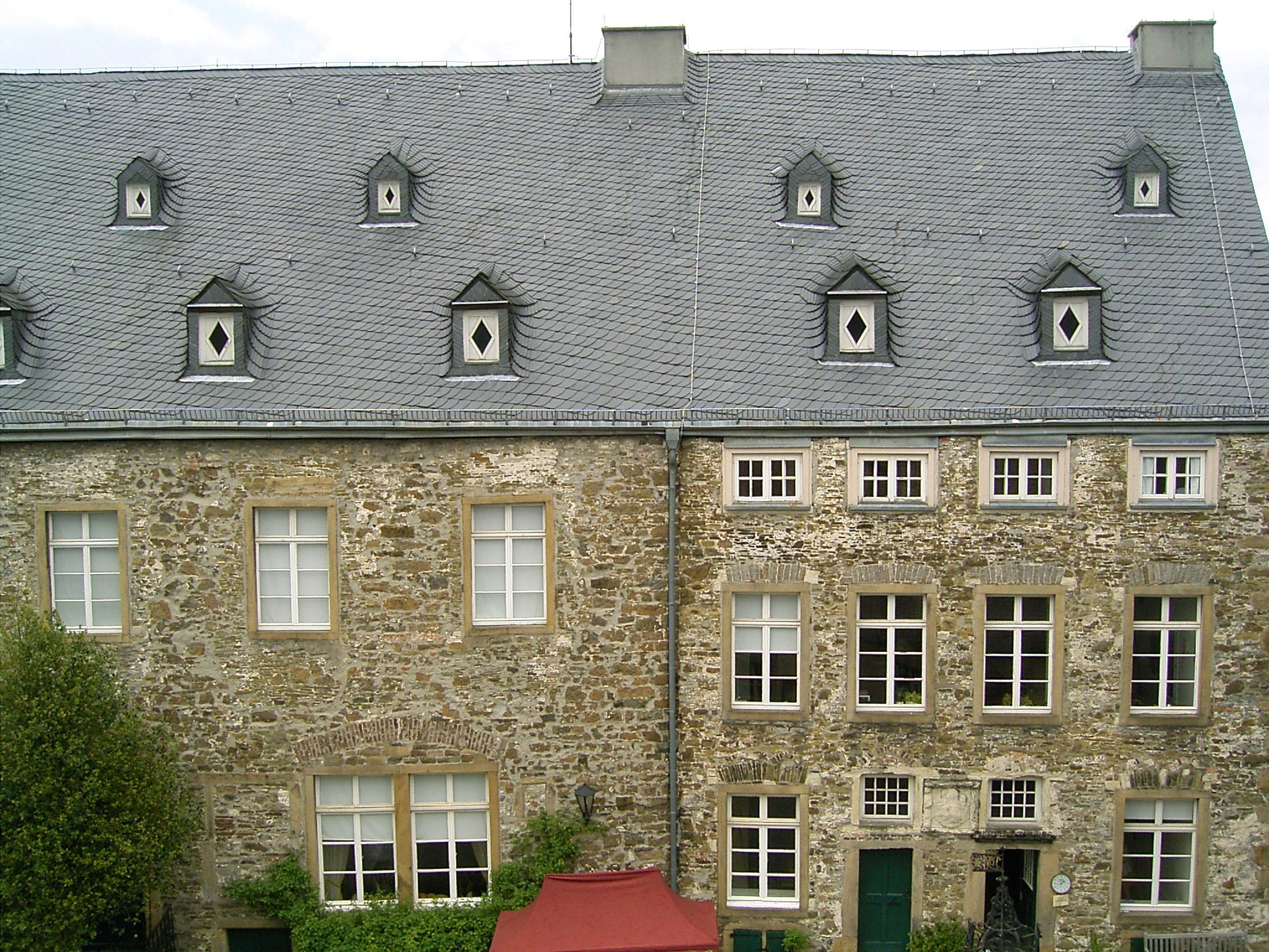 Schloss Hohenlimburg in Hagen-Hohenlimburg